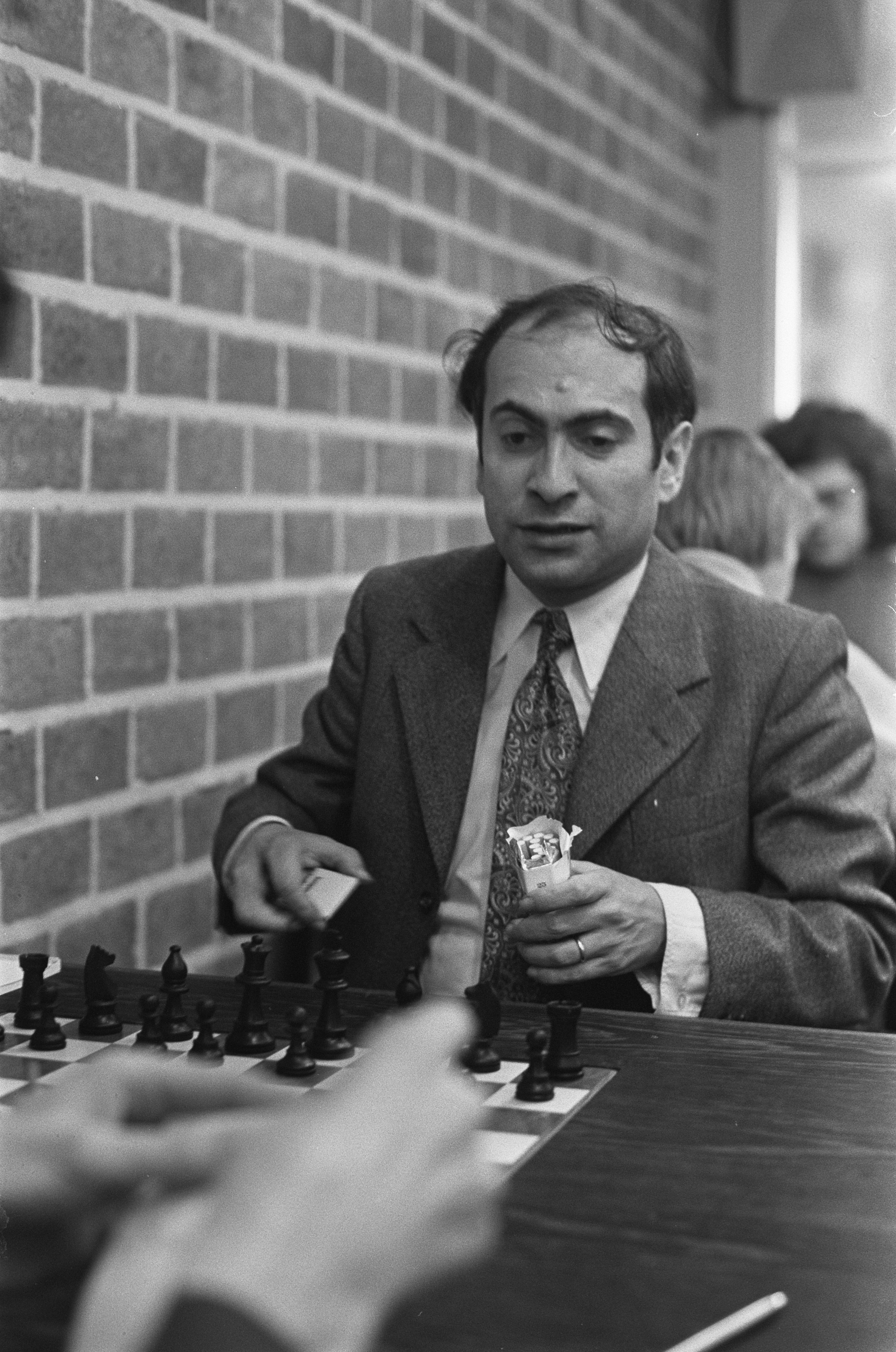 Hoogovens-schaaktoernooi te Wijk aan Zee 1973, eerste ronde, M. Tal.